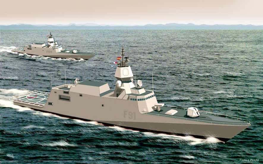 2_corbetas-_afcon-wallpaper